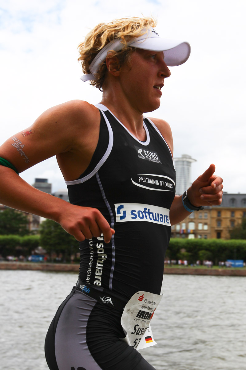 Susan Dietrich beim Ironman Germany 2012 in Frankfurt am Main.